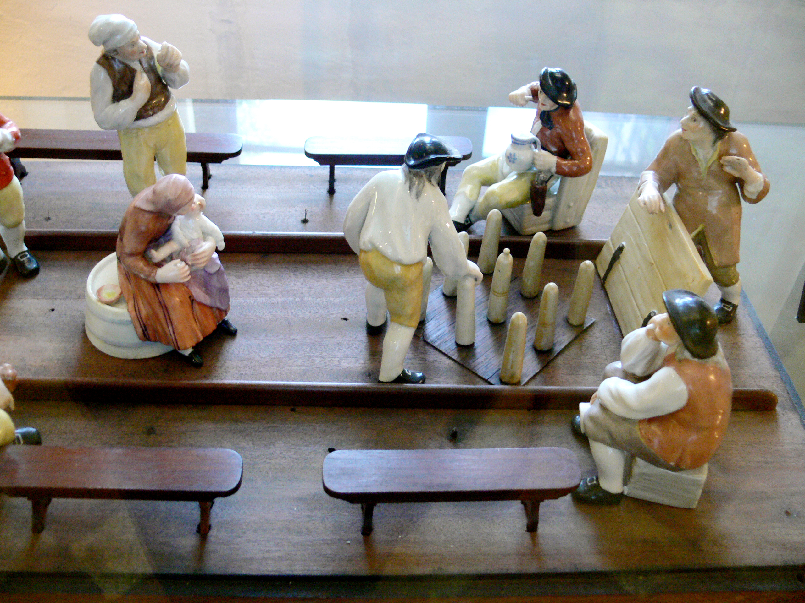 Modell einer Kegelbahn. Museum für Thüringer Volkskunde, Erfurt.